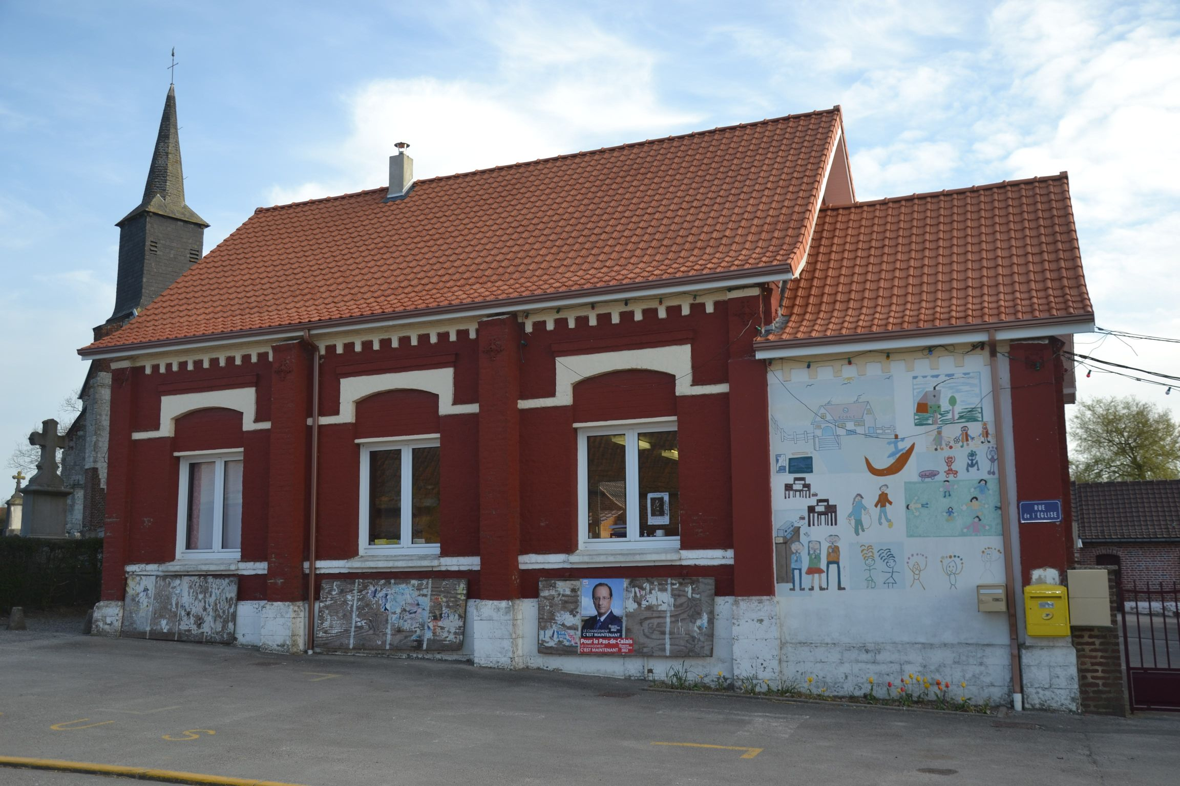 Mairie-école de Crépy